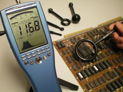 Spectrum Analyzer zur Messung von Magnetfeldern mit Nahfeldsonden